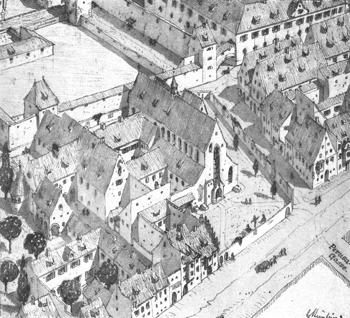 Abb. 48: Das Franziskanerkloster